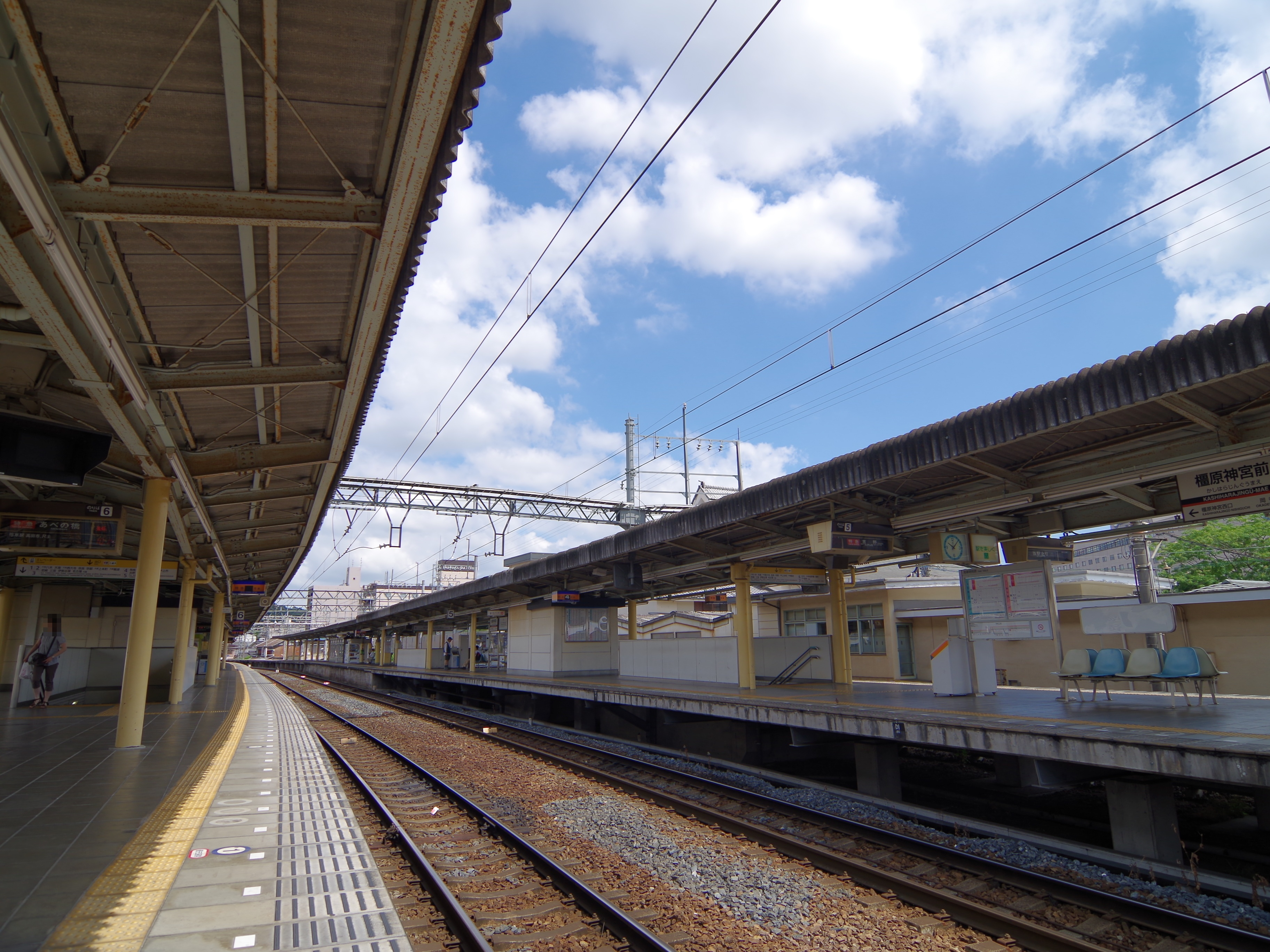 近鉄南大阪線・吉野線 橿原神宮前駅 2013.6.16